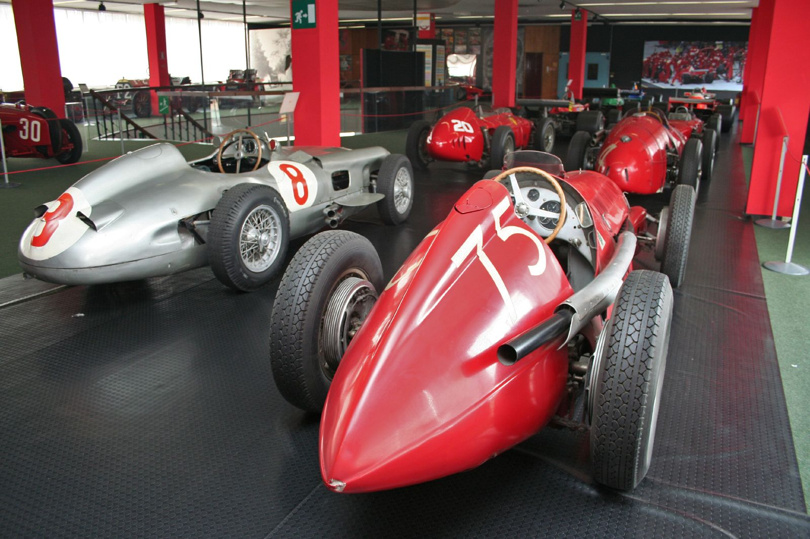 Alfa Romeo Alfetta 159 Grand prix del 1951 e Mercedes Benz RW 196 del 1954